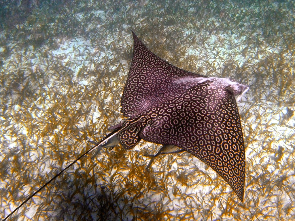 Eagle Ray